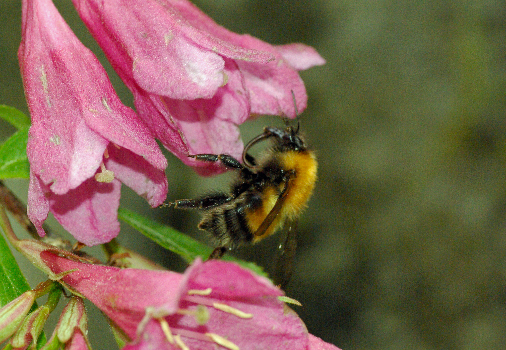 Lushatthumle på Weigela før blomstringen til vertsplanten har begynt å blomstre